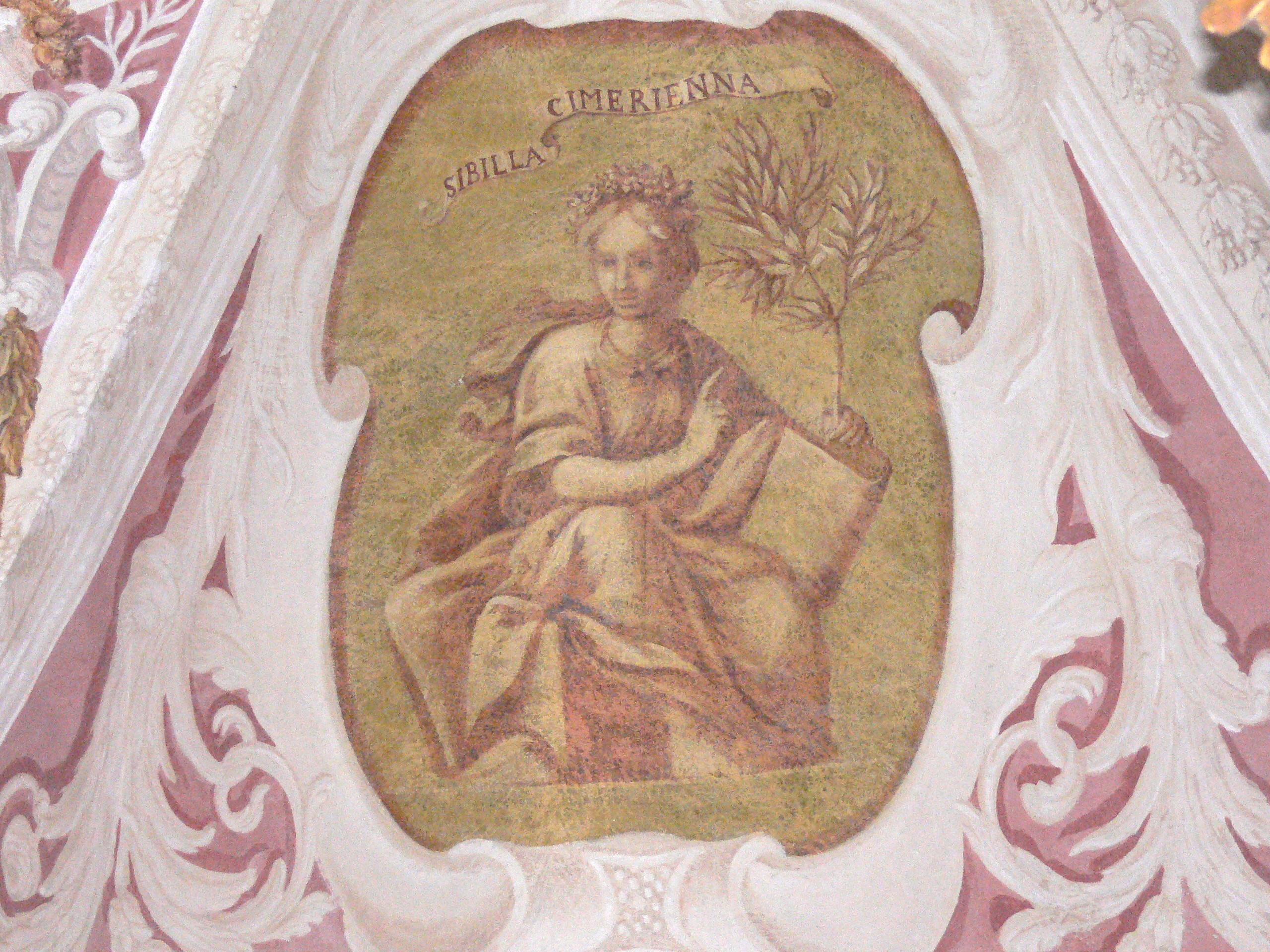 Pfarrkirchen i.M. Parish church: Fresco - Sibylla Cimerienna.